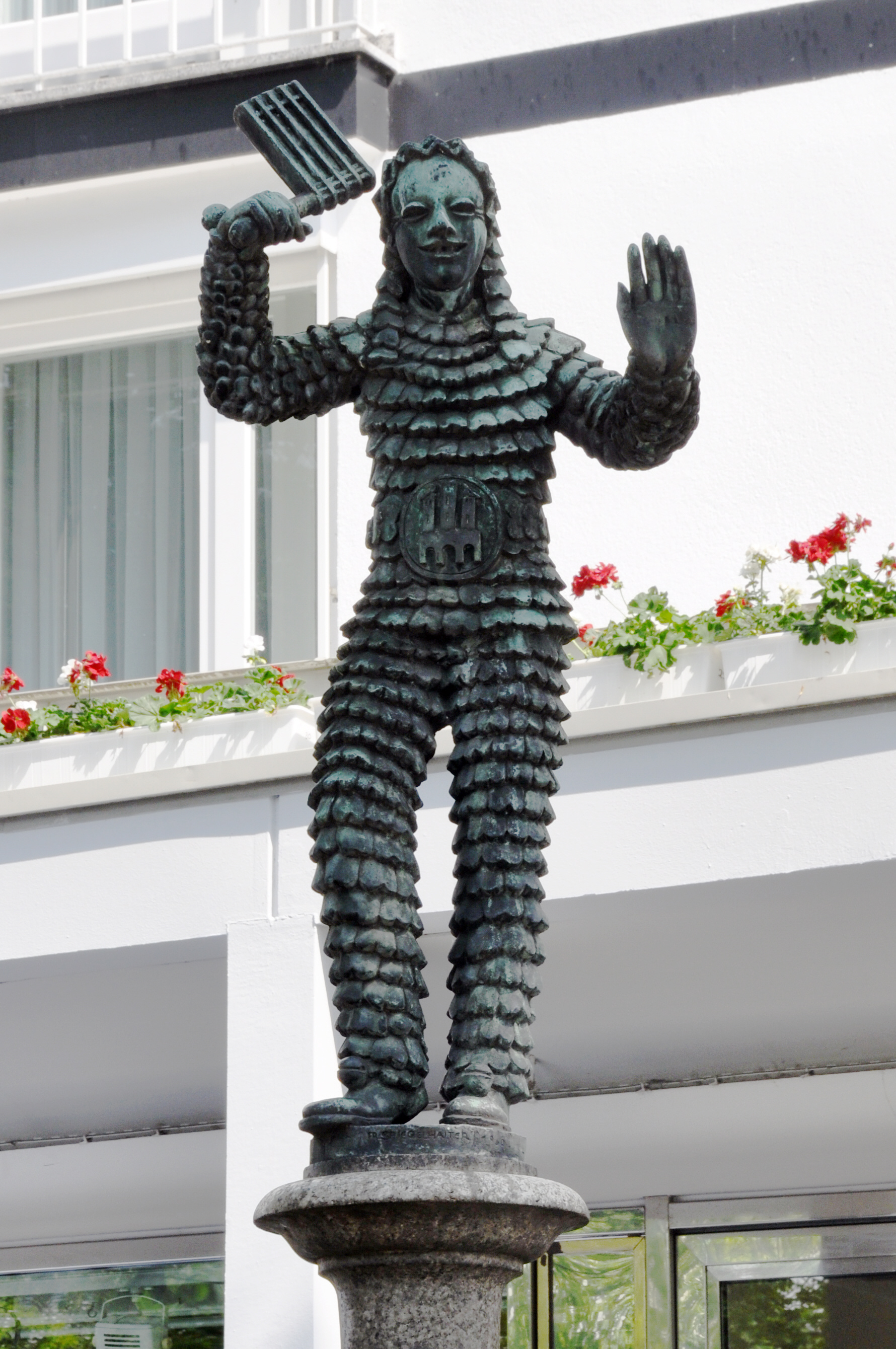 Freiburg im Breisgau, Narrenbrunnen, Figur eines Flecklehäs, Statue von Franz Spiegelhalter, 1961 (auf einem Brunnen des 19. Jh.)